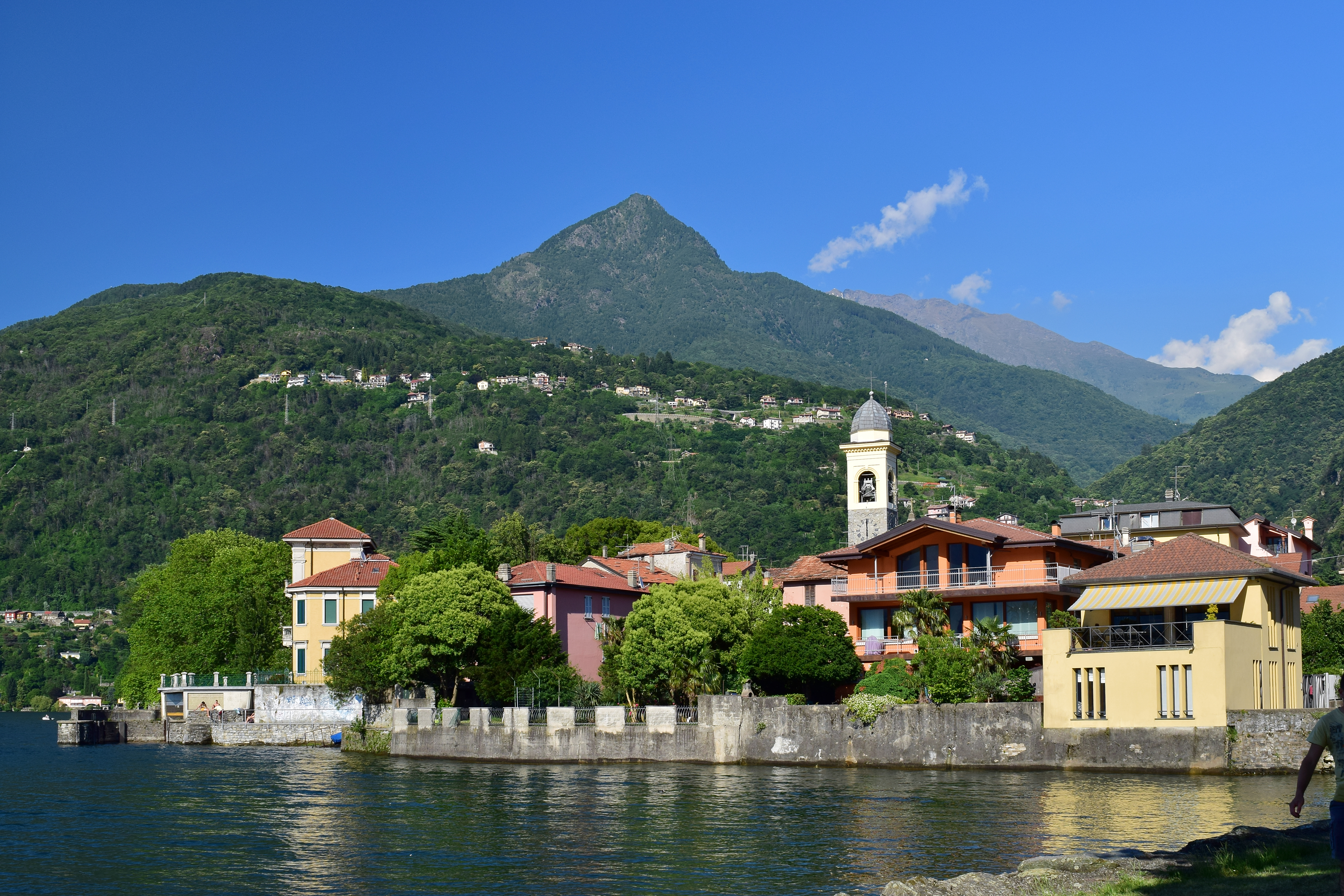 Nordseite von Dervio